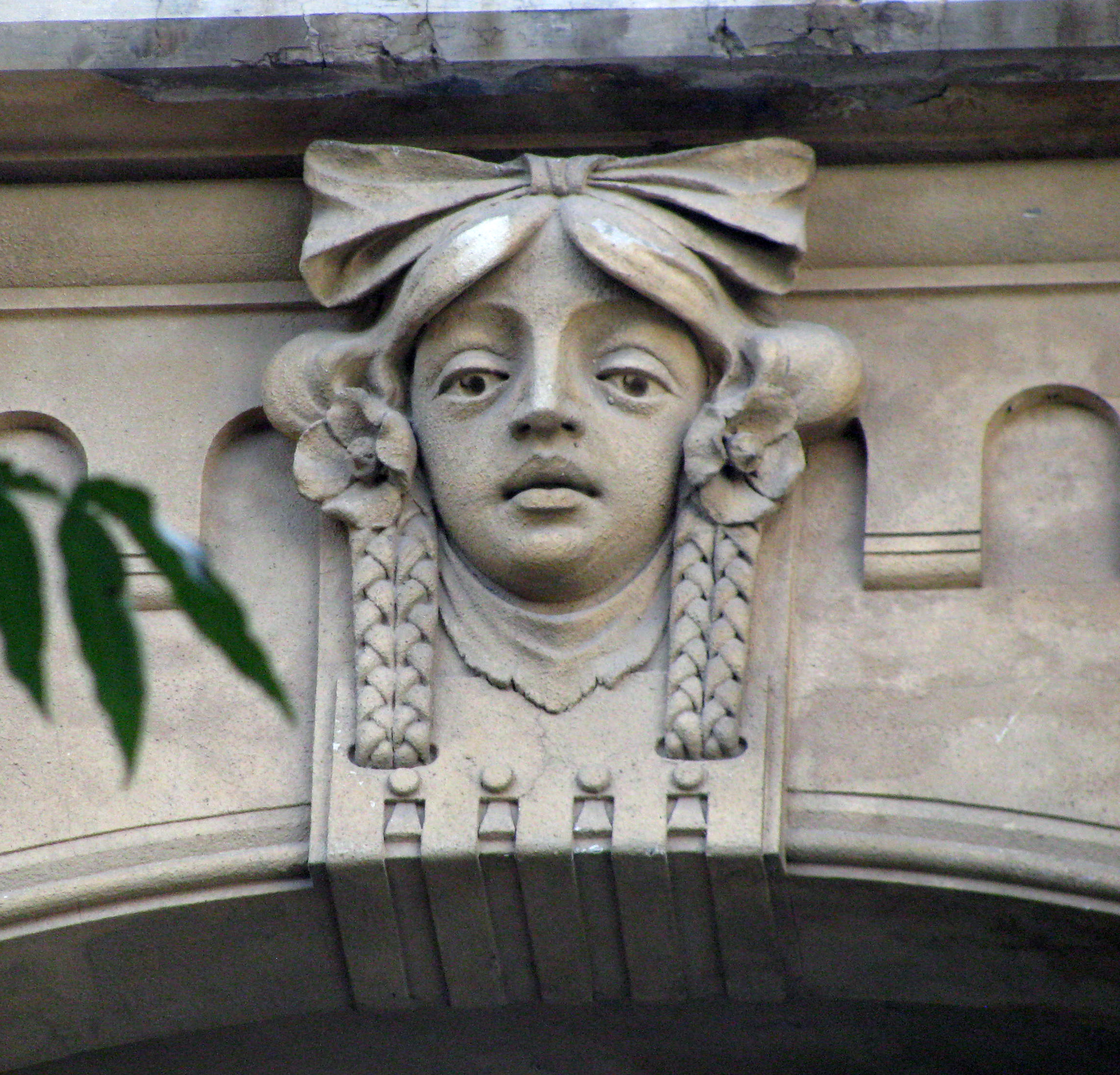 Будинок по вулиці Богомольця, 7 (Львів). Запроектований архітектурно-будівничим бюро Івана Левинського. Маскарон на фасаді.